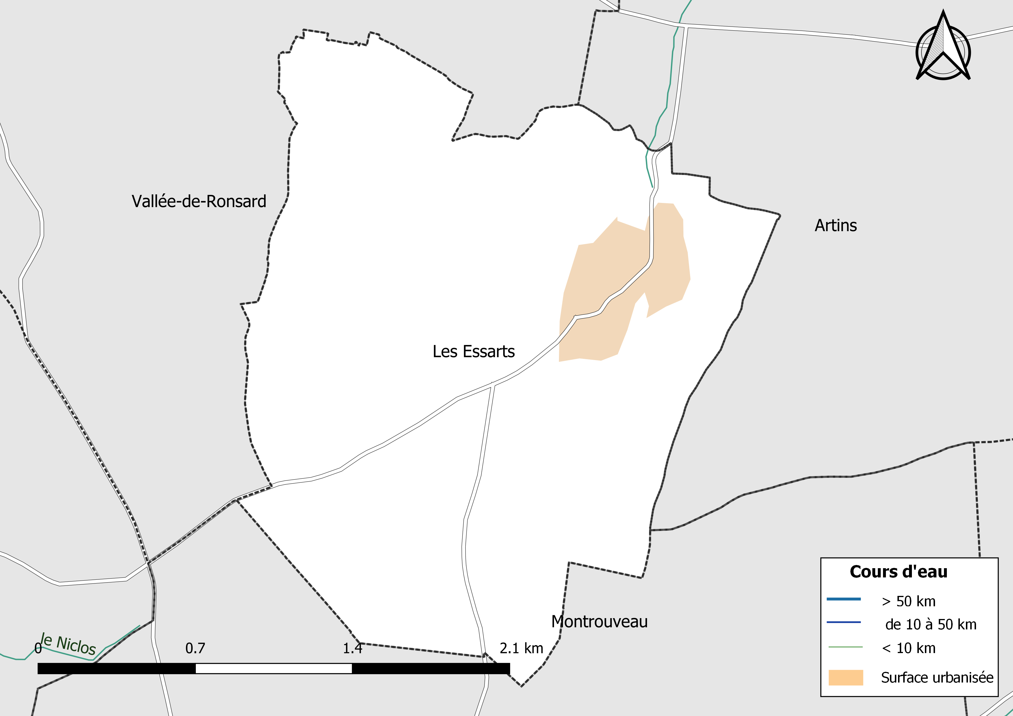 Carte du réseau hydrographique de la commune de Les Essarts (Loir-et-Cher) (France).